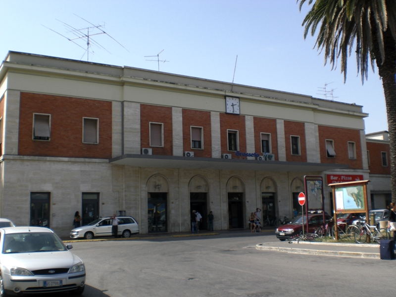 Fabbricato viaggiatori stazione di Grosseto